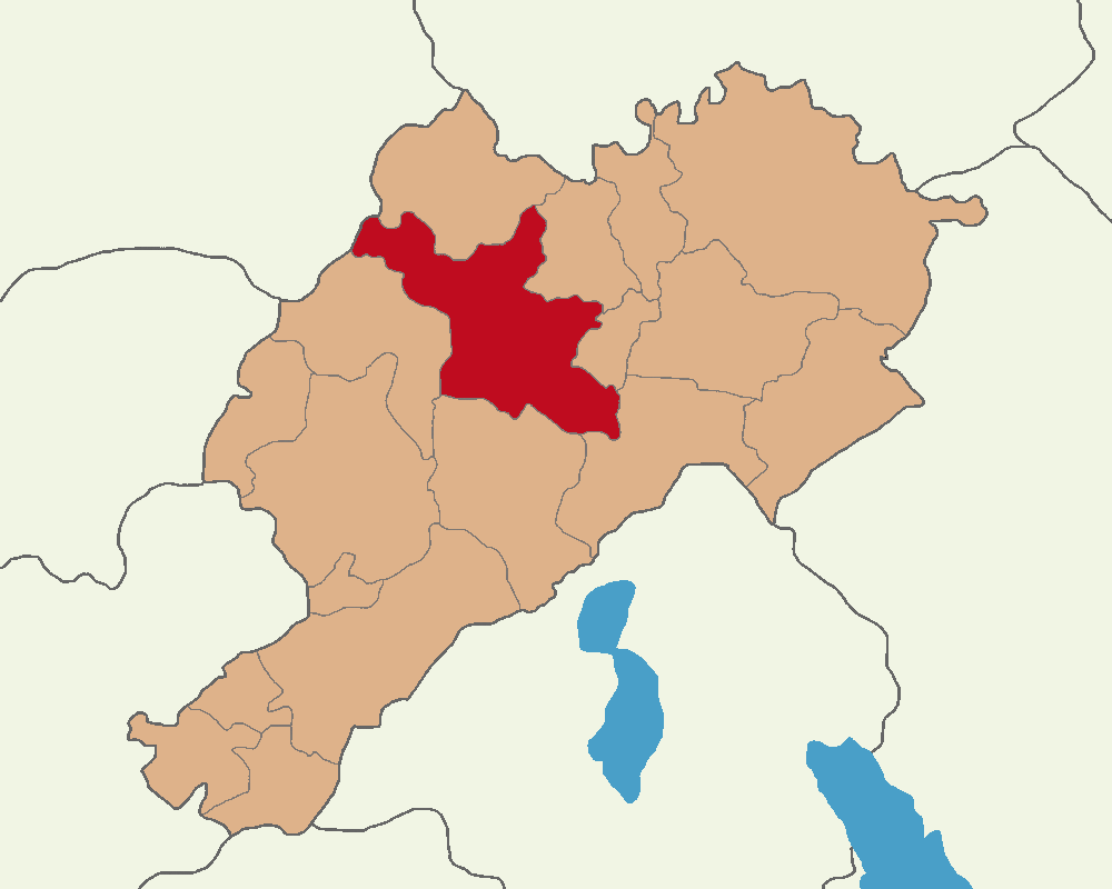 Yalova Merkez ilçesini konumu